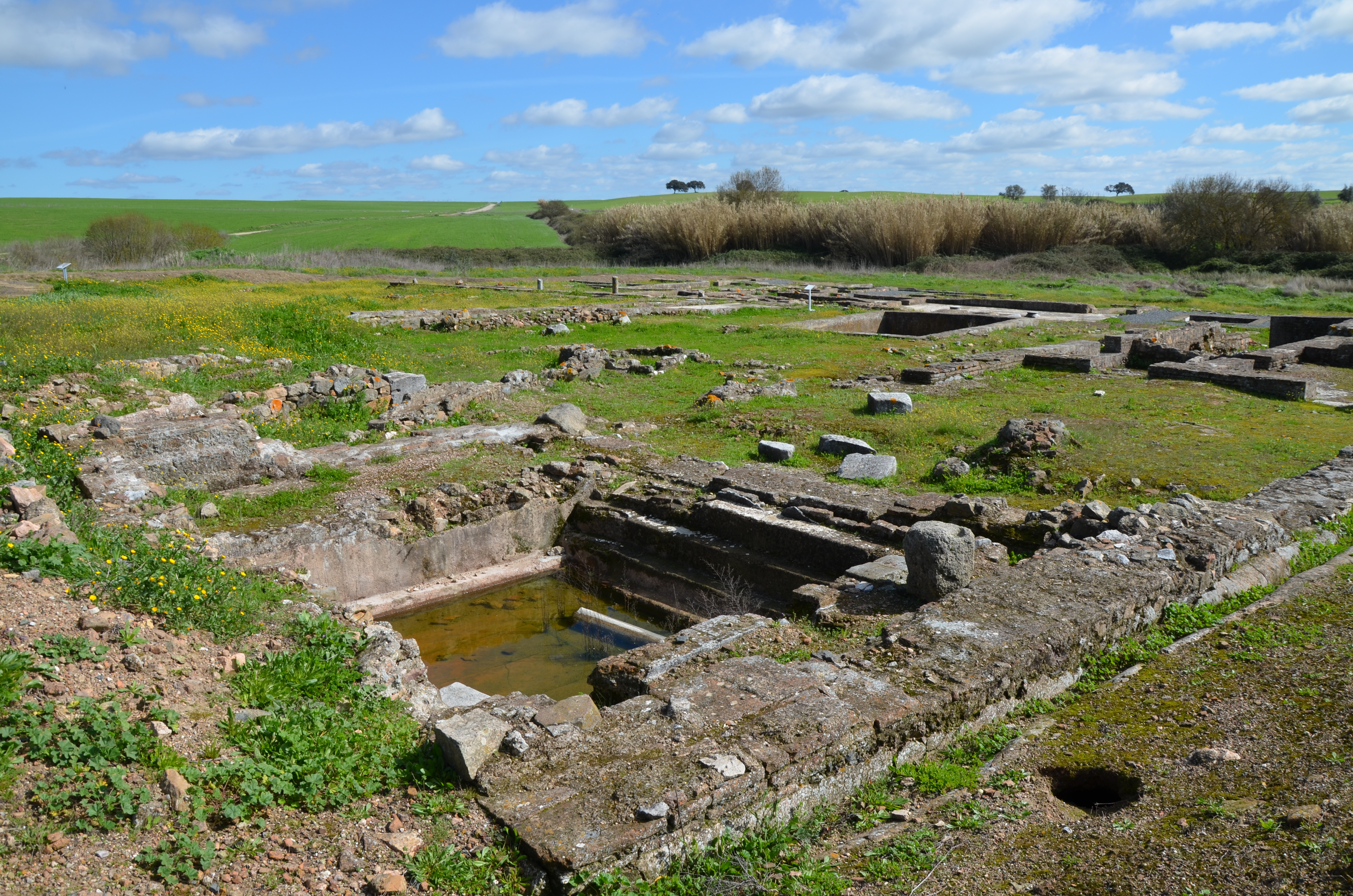 Roman Villa of Pisões, Portugal Roman villa, Pisões